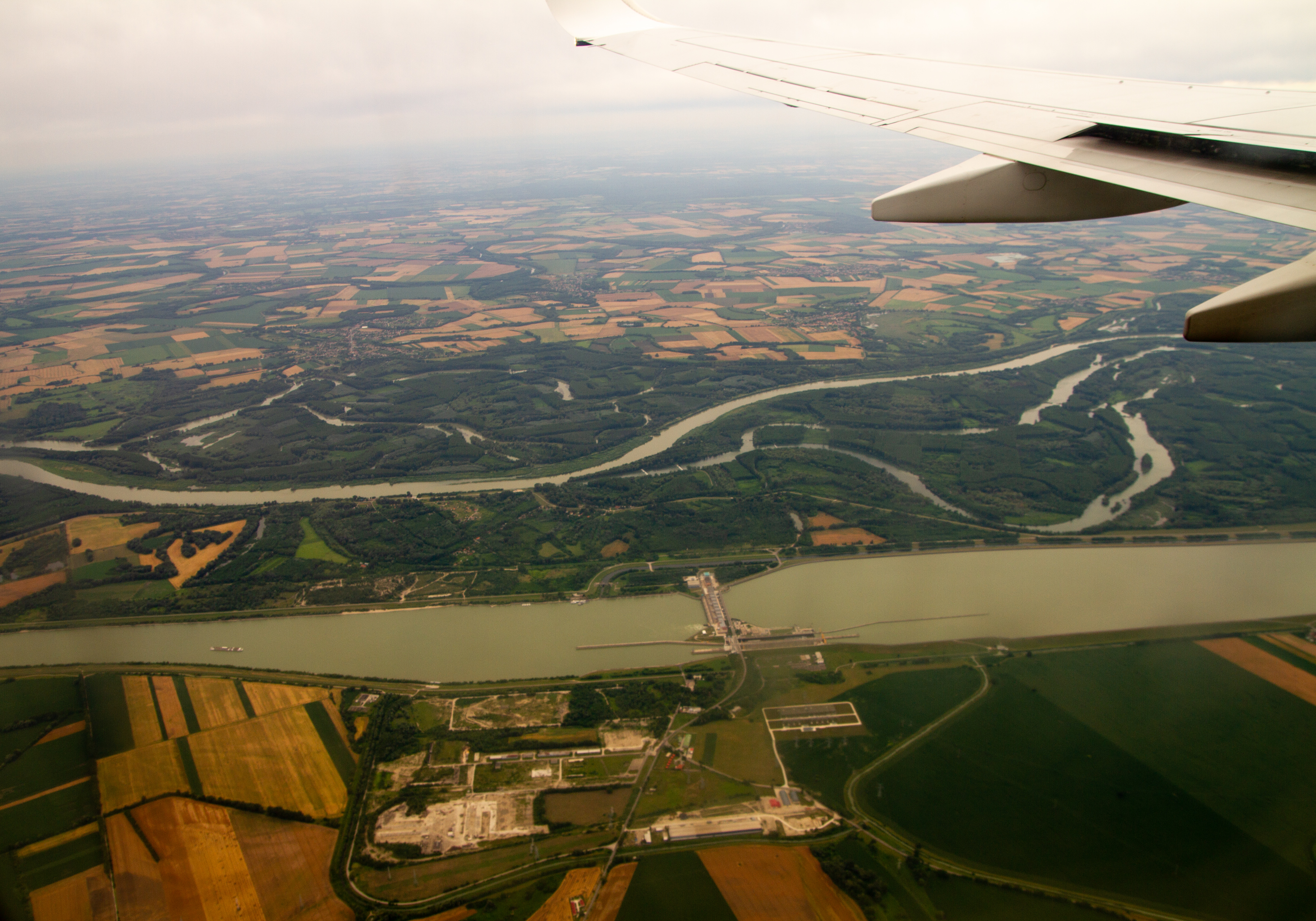 Gabčíkovo - Vodné dielo